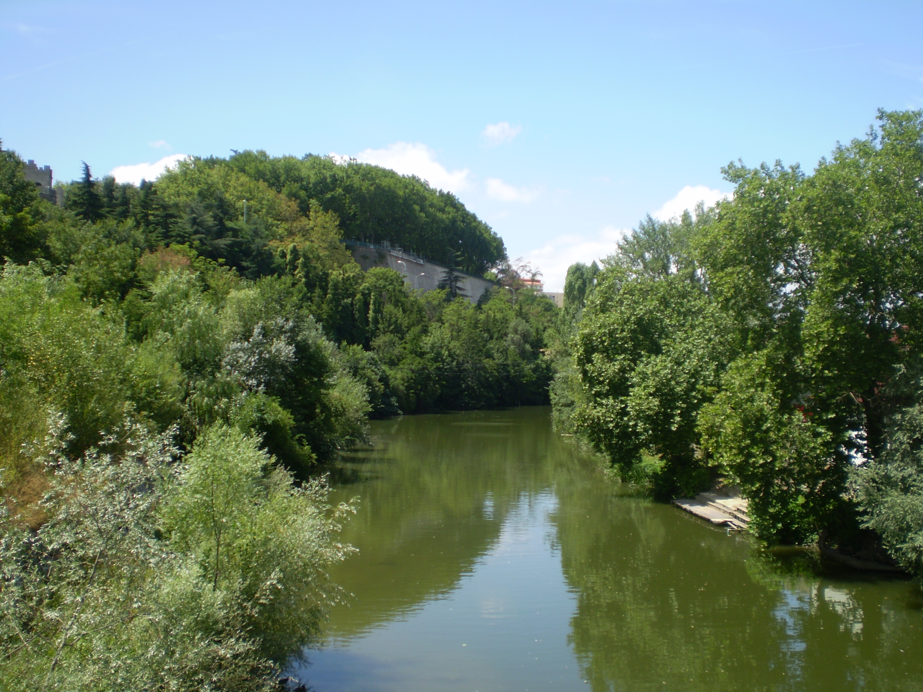 Río Arga a su paso por Pamplona con la ciudad de fondo